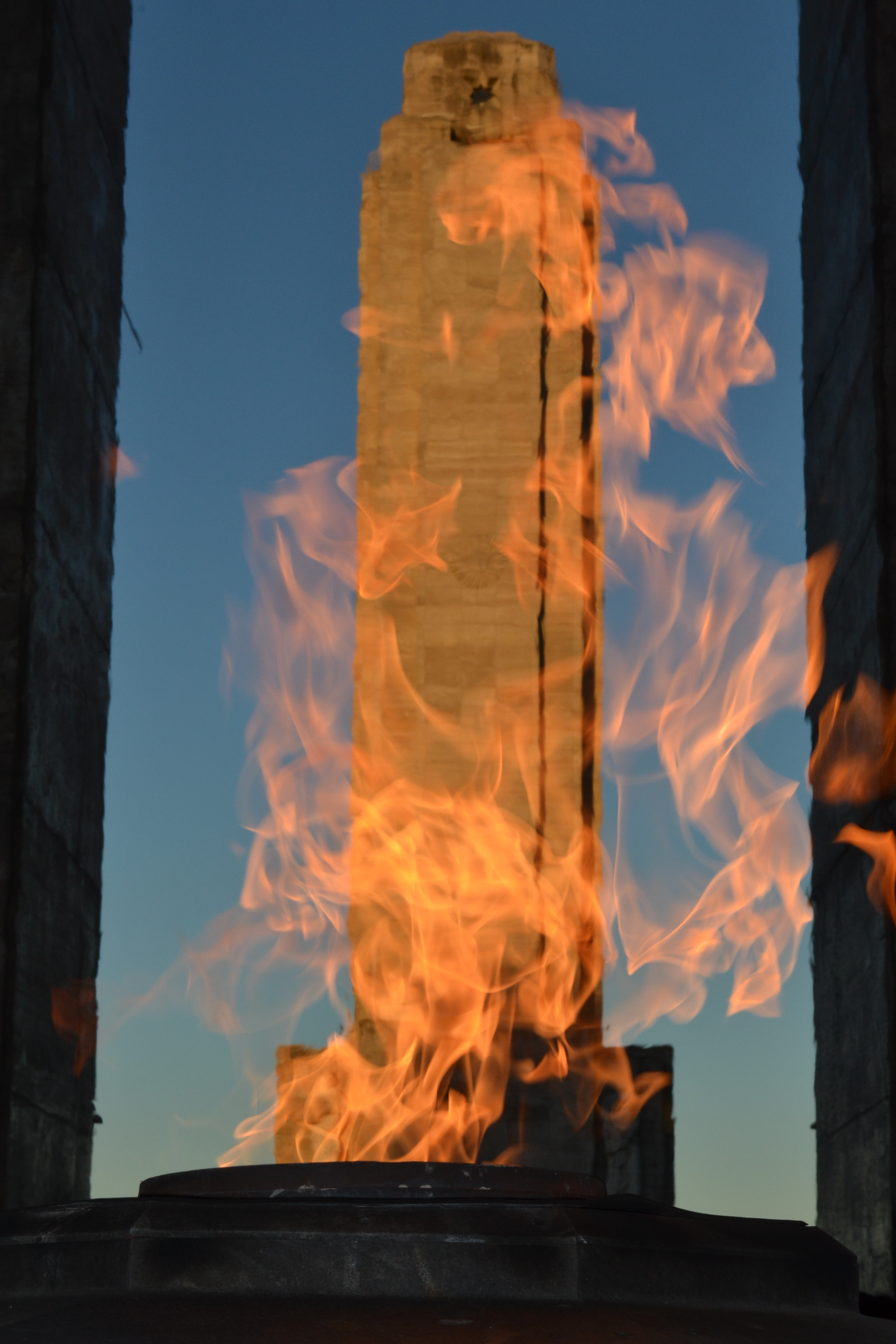 Monumento a la Bandera en llamas